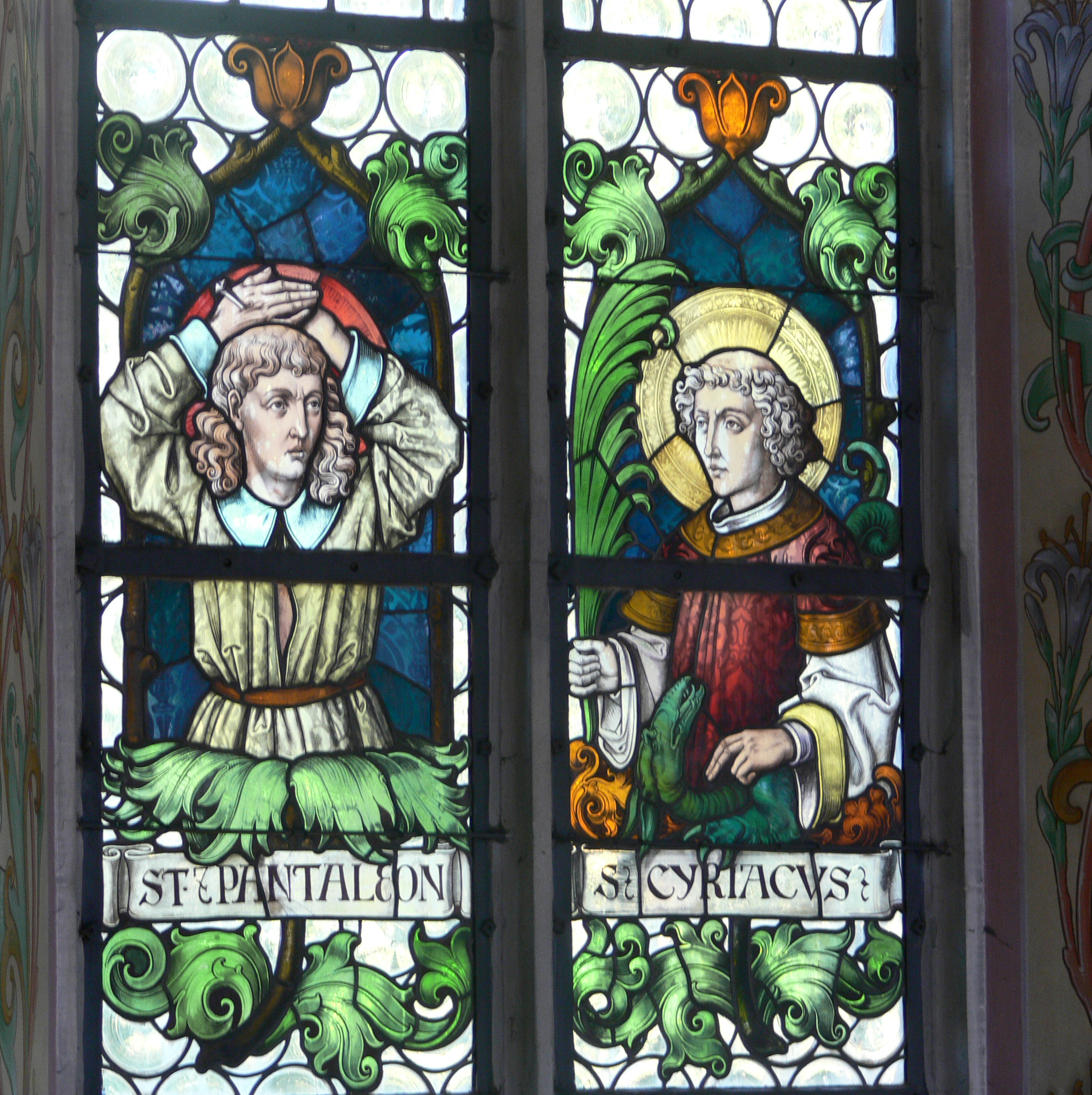 Pfarrkirche St. Pelagius, Weitnau, Nothelferfenster, St. Pantaleon und St. Cyriacus